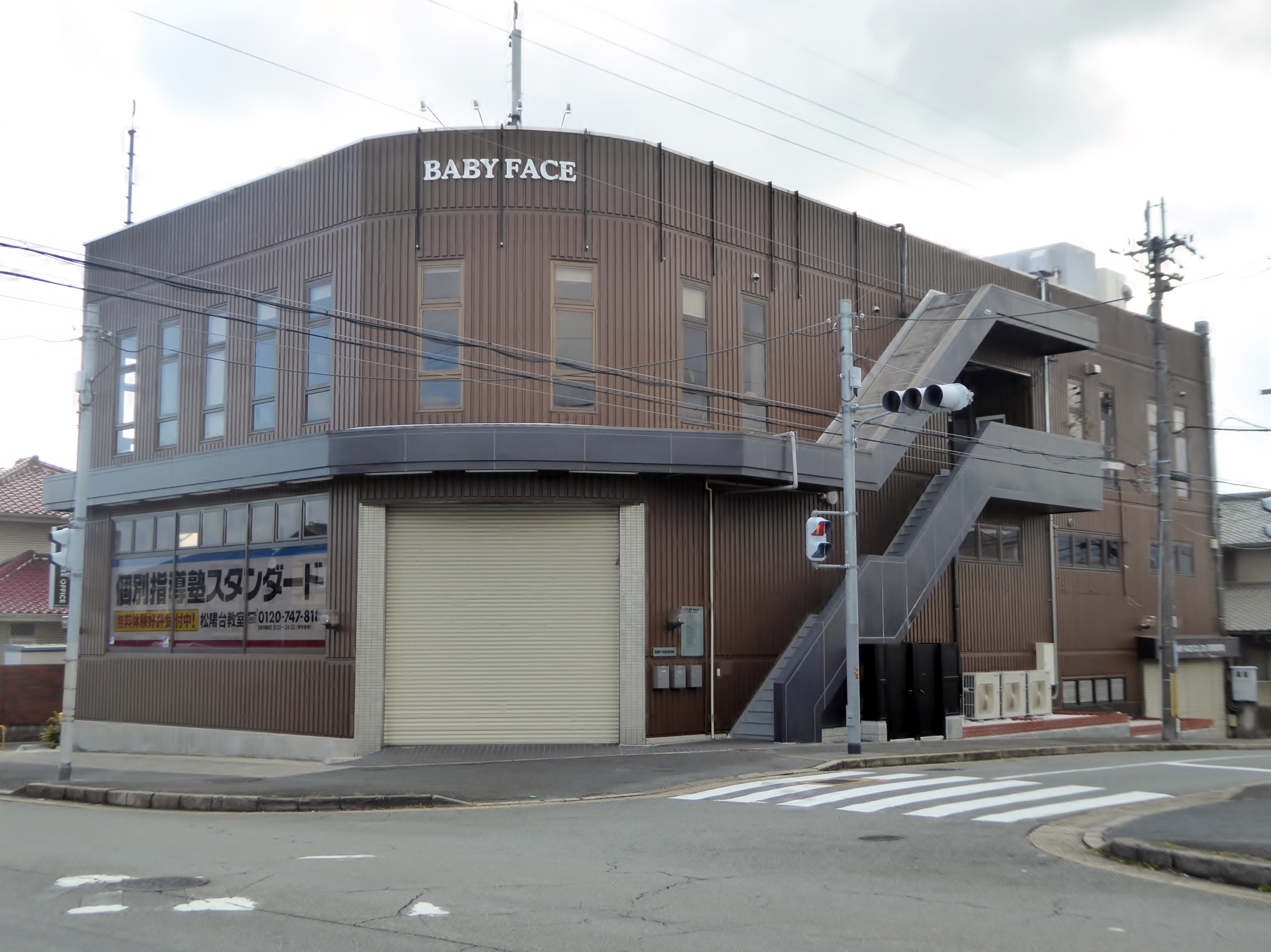 BABY FACEビルを撮影。